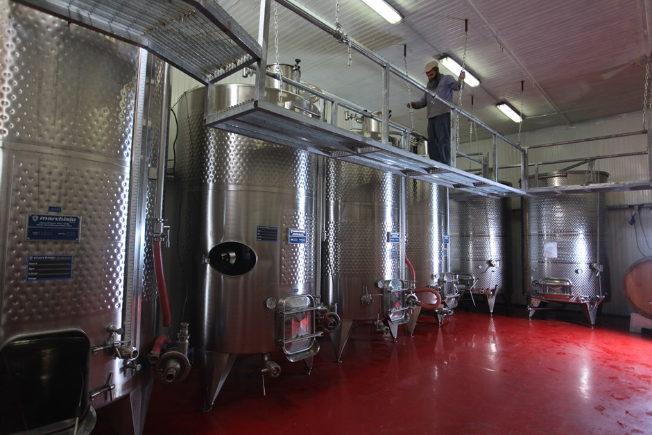 חדר התסיסה ביקב לוריא